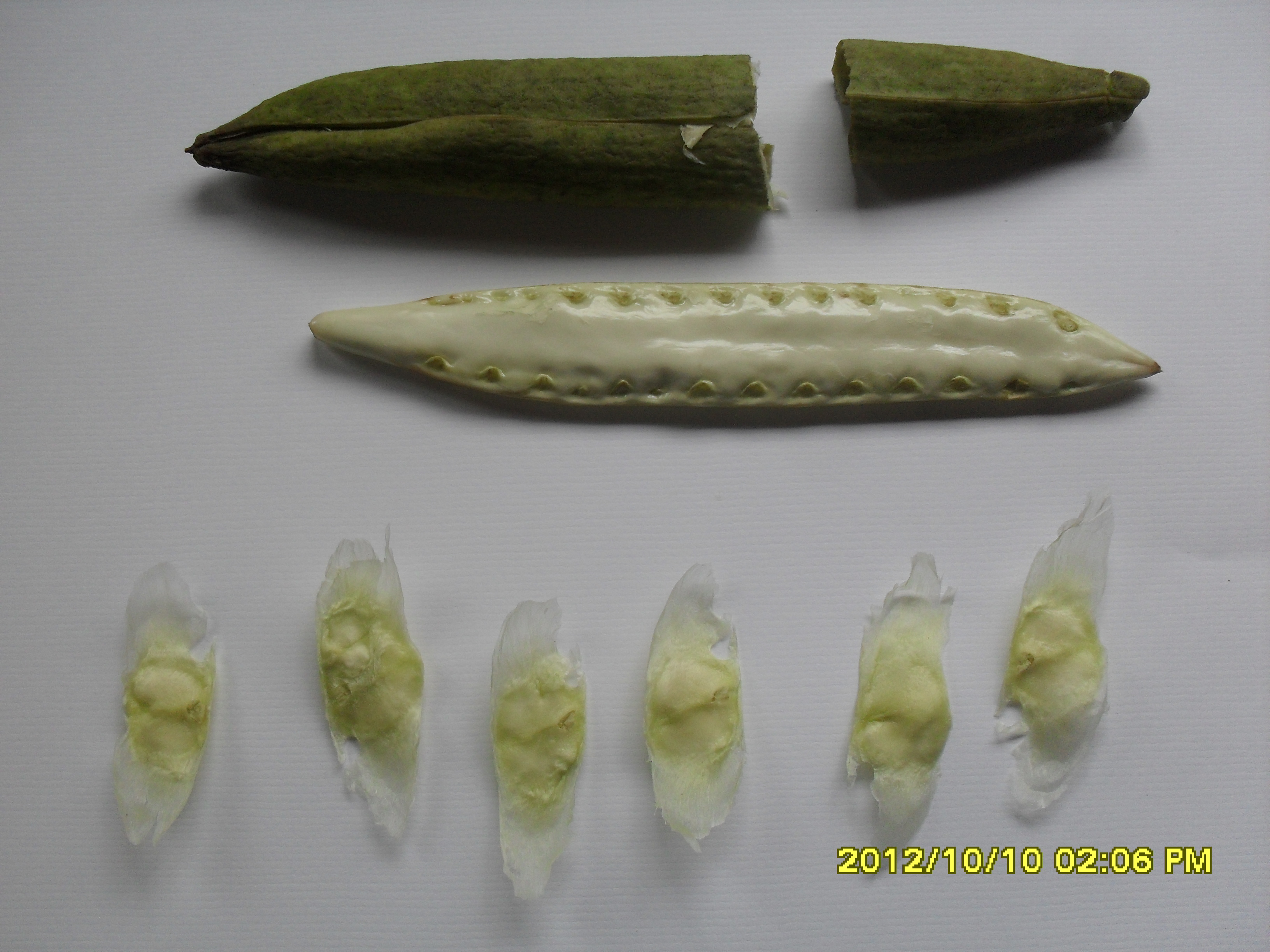 contenido de la cápsula de T.aurea